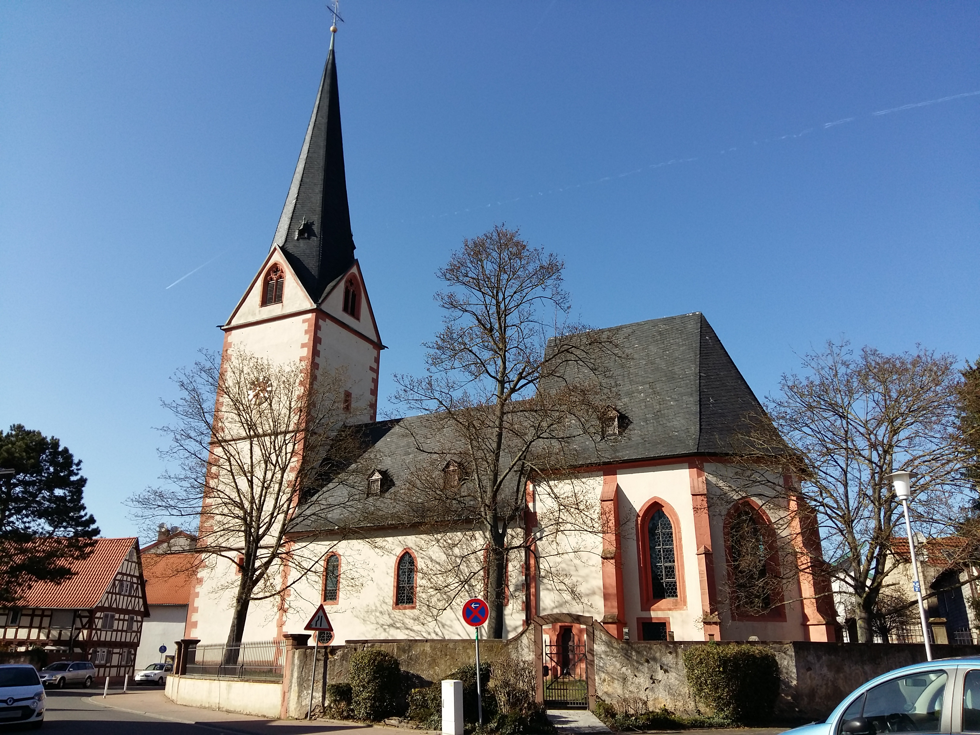 Die Evangelische Kirche von Altheim (Münster (Hess.)) in der Kirchstraße 20 (von Süden)